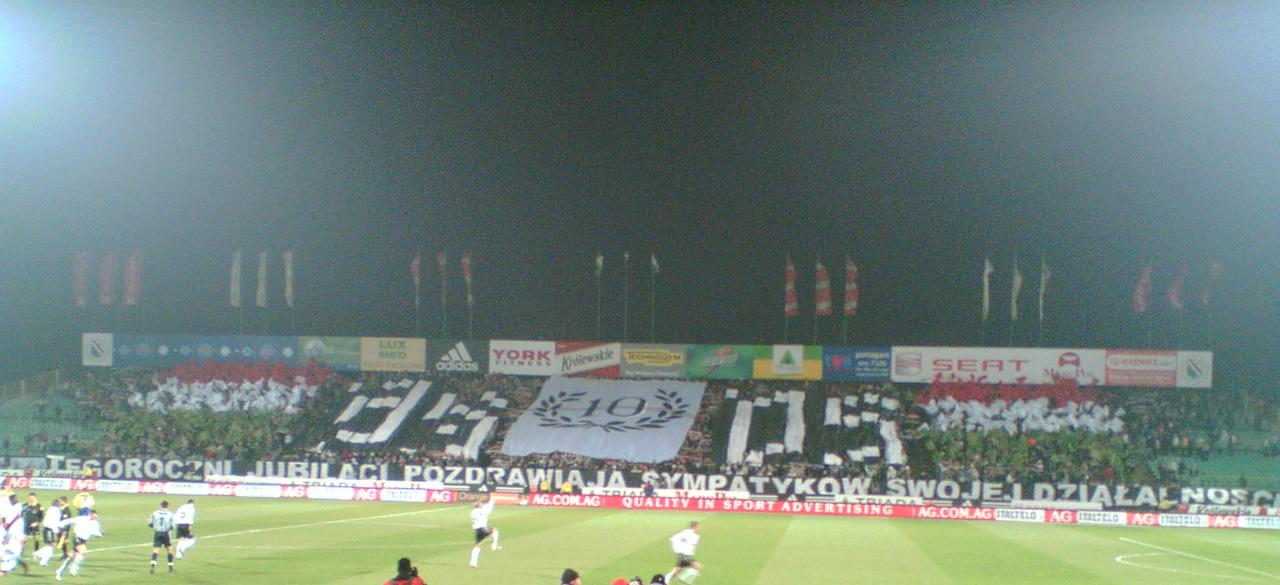 Wycięta część zdjęcia zamieszczona na wolnej licencji w Wikimedia Commons.